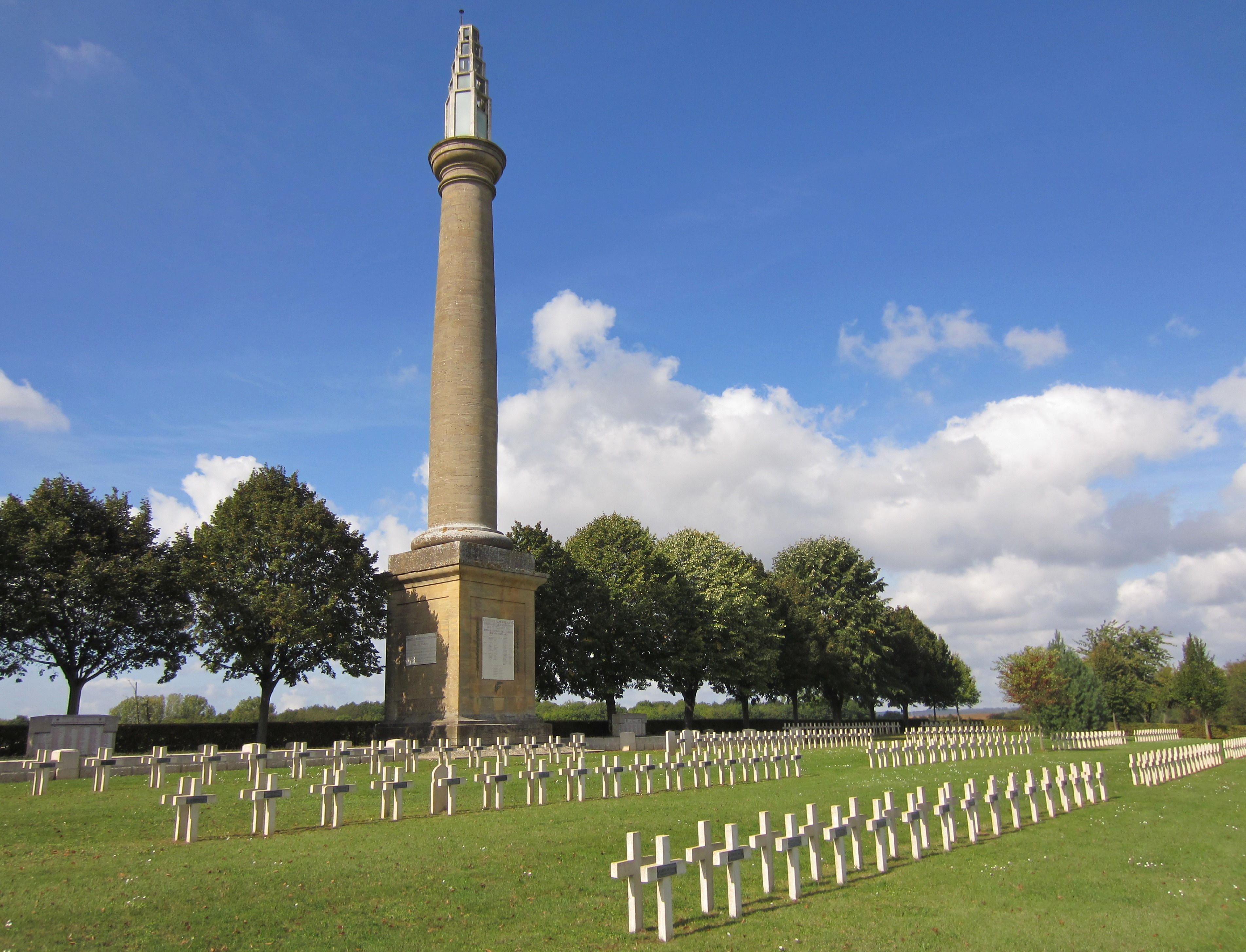 Description cimetiere militaire francais Pierrepont 54 Date24 September 2011Sourcemon appareil photoAuthorAimelaimePermission (Reusing this file) cimetiere militaire francais Pierrepont 54